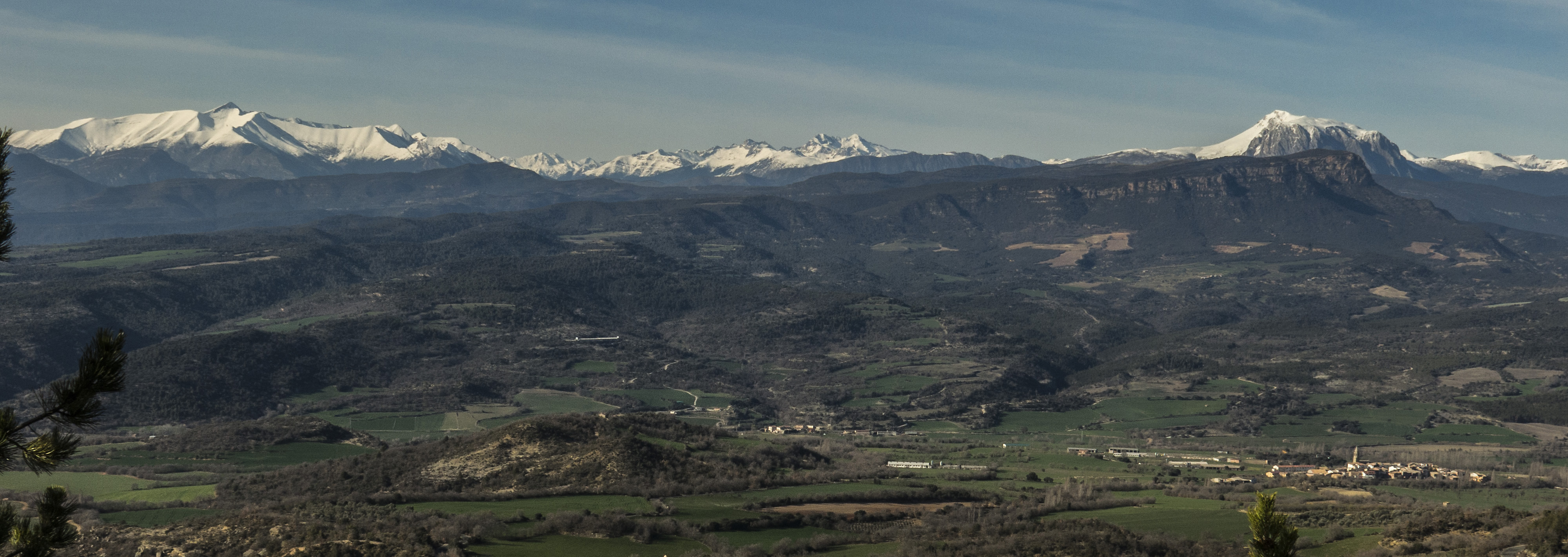 Llaguarres era un antic municipi de la Ribagorça de parla catalana. S'incorporà a Capella el 1965 (Decret 4338/64, de 24 de desembre).